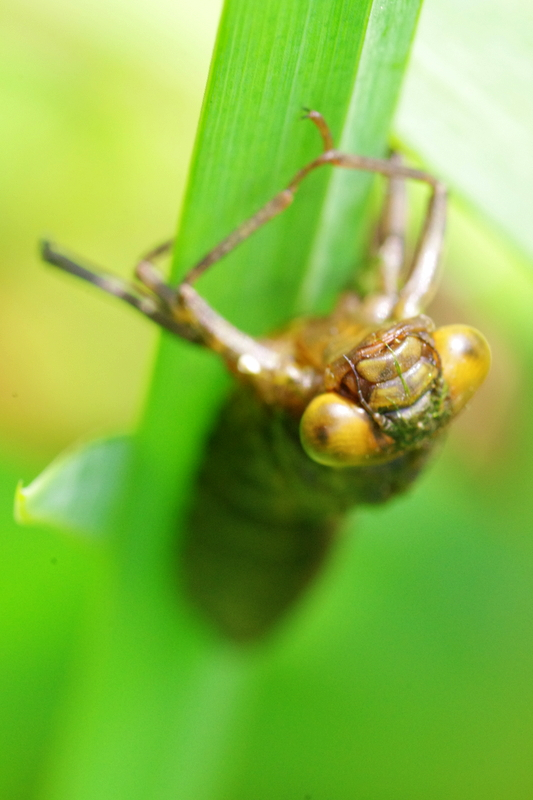 Żagnica sina (Aeshna cyanea) - przeobrażenie. Larwa wychodzi z wody i wspina się na liść kosaćca żółtego.